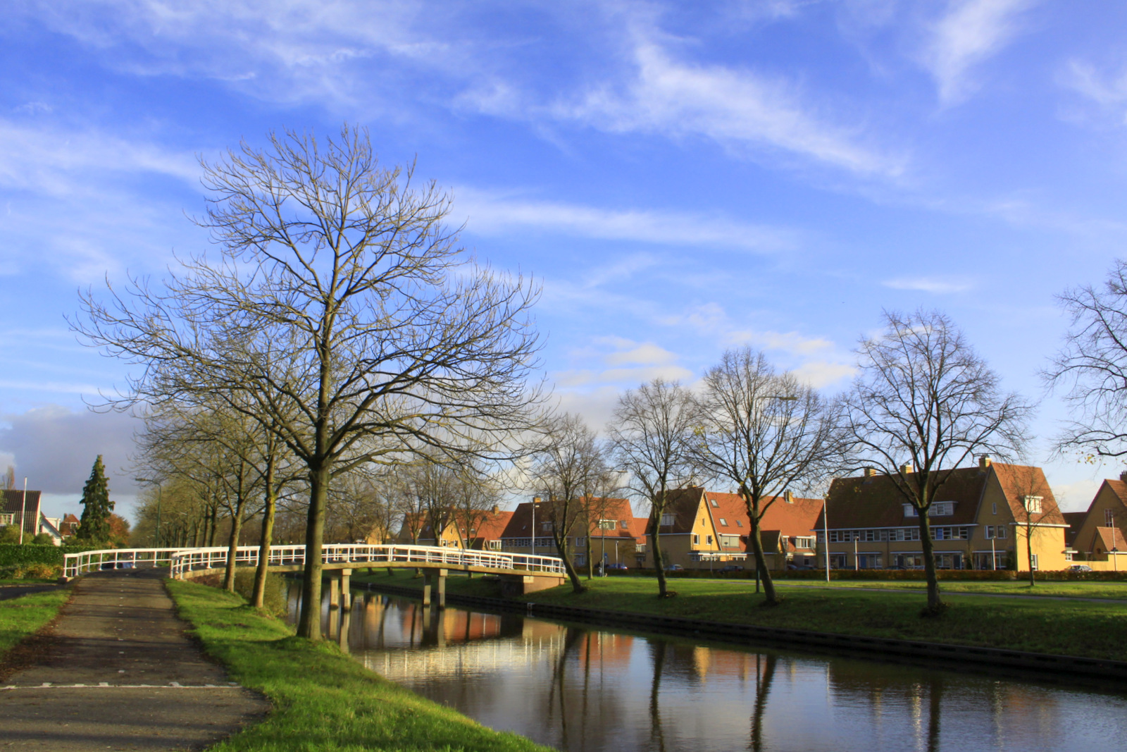 Veldhuizen een nieuwbouwwijk genoemd naar het buurtschap Veldhuizen.